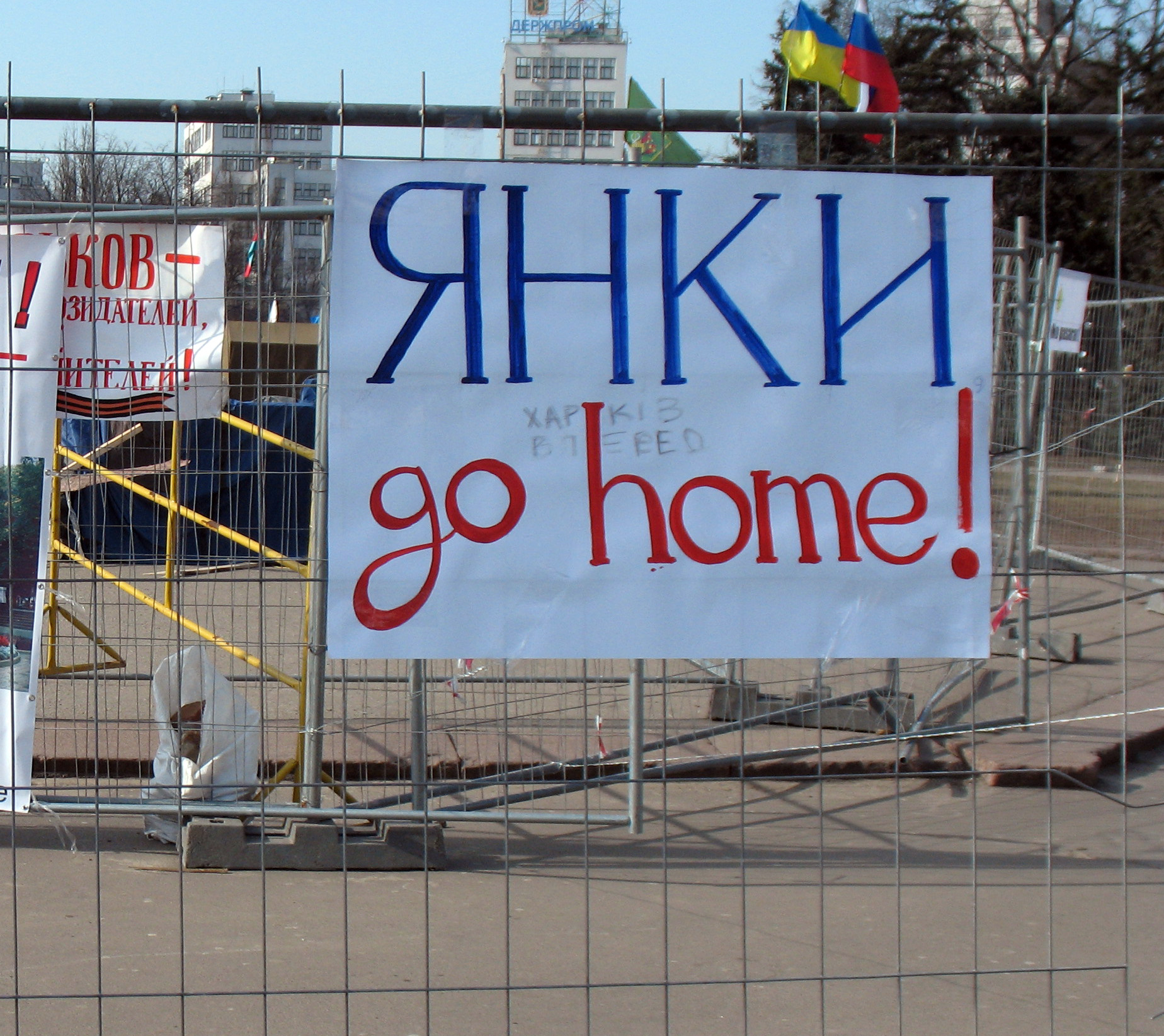 Харьков, 28 февраля. Оборона памятника Ленину горожанами от приехавших в город 22 февраля националистических боевиков "Правого сектора", которые пытаются его снести. Наружное ограждение (из трёх рядов). Рядом русский и украинский флаги. "Харьков - город созидателей, а не вредителей!" "Янки, гоу хоум!" (плакат по поводу якобы завезённых в небольшом количестве в город наёмников из американского Greystone).)